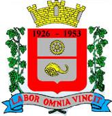 Brasão de armas do município de Ferraz de Vasconcelos, São Paulo, Brasil